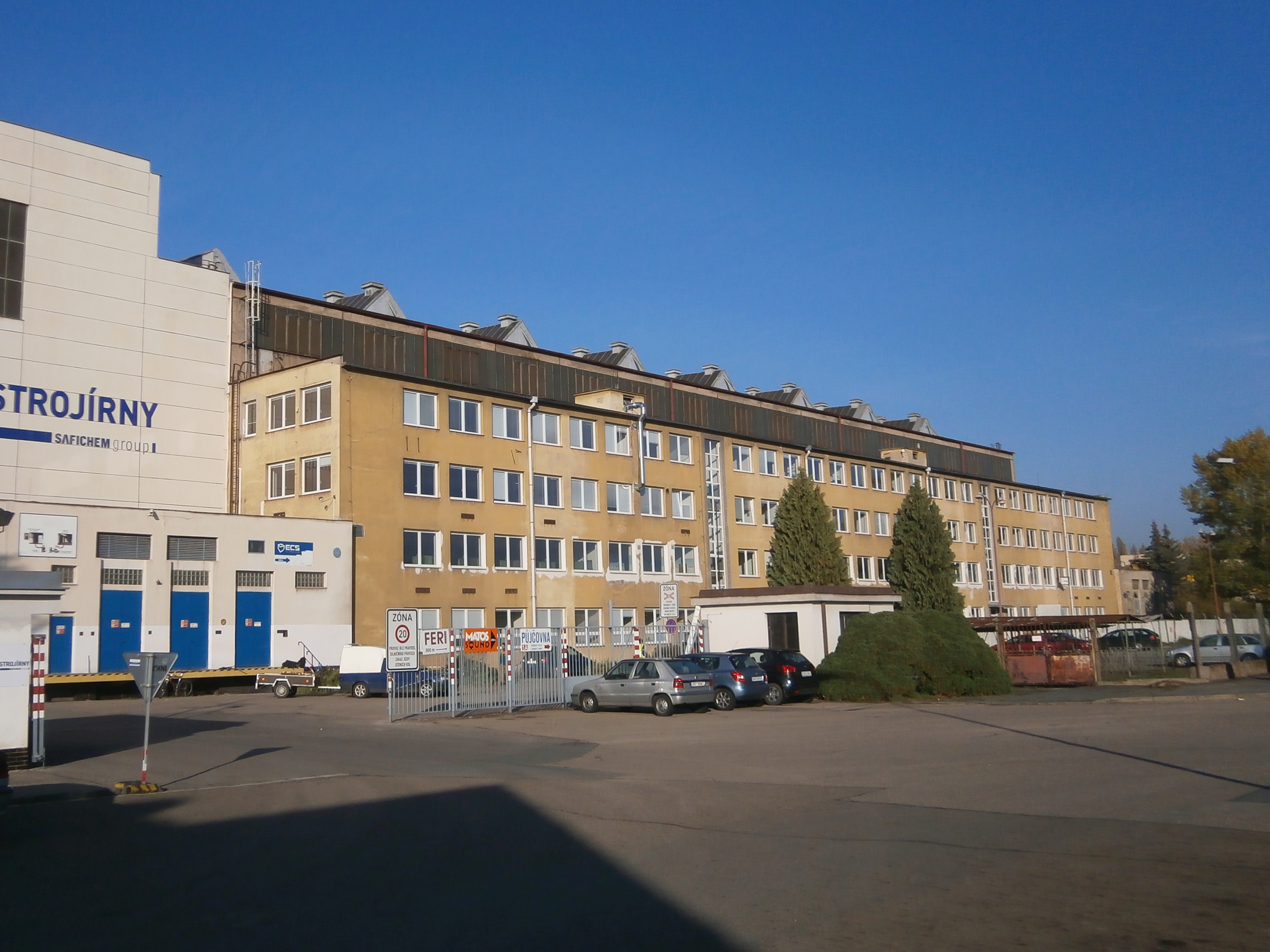 ZVU Strojírny